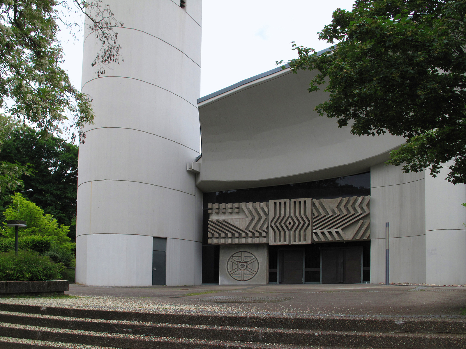 Otto Herbert Hajek, Portalfries an der Kirche "Zum Heiligen Bruder Klaus", 1967-1969, Stuttgart-Ost, Albert-Schäffle-Straße